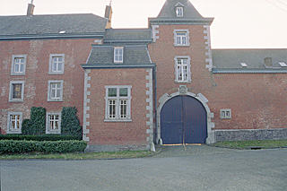 Chateau Pecsteen